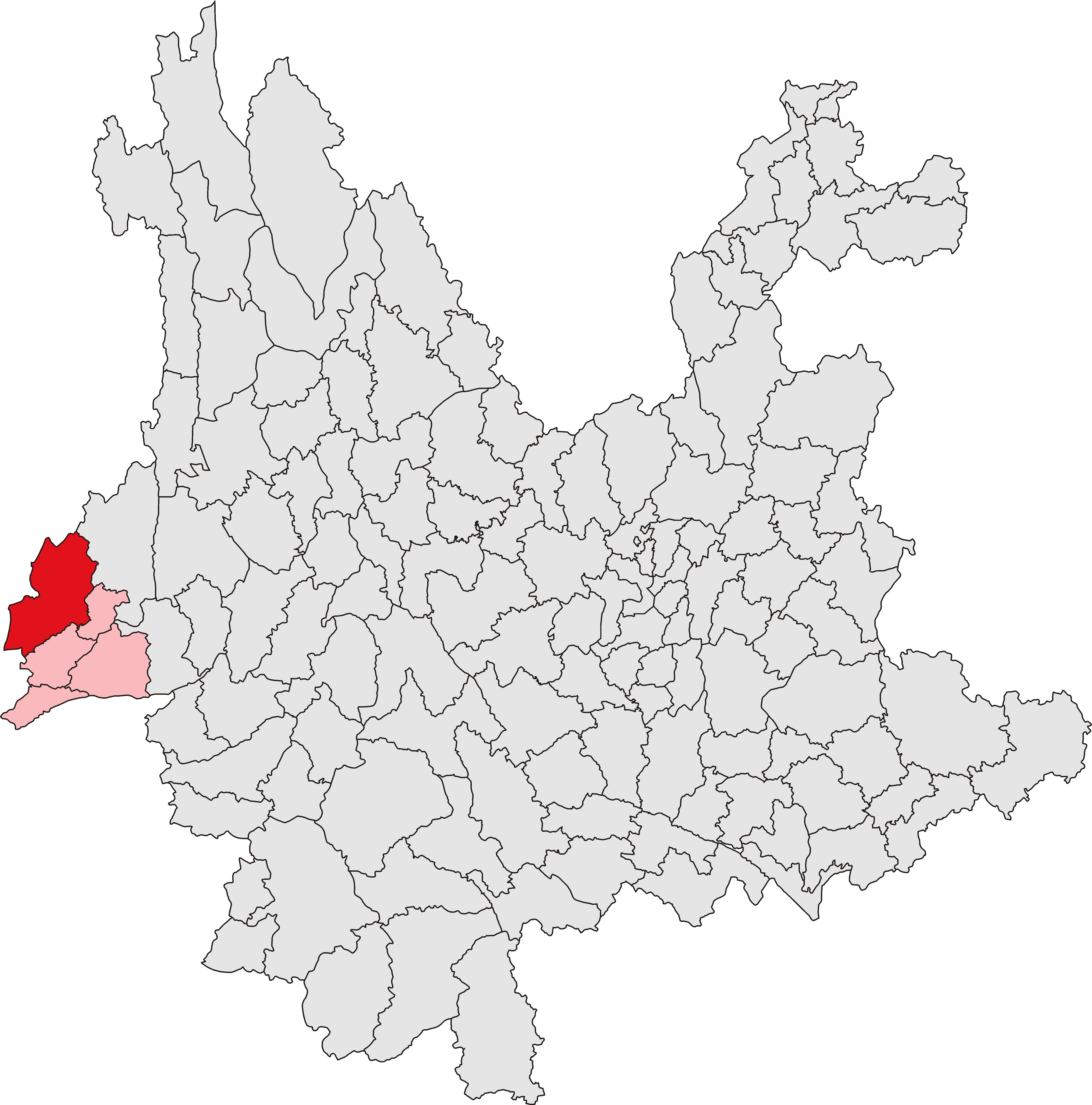 中文（中国大陆）: 盈江县位置图